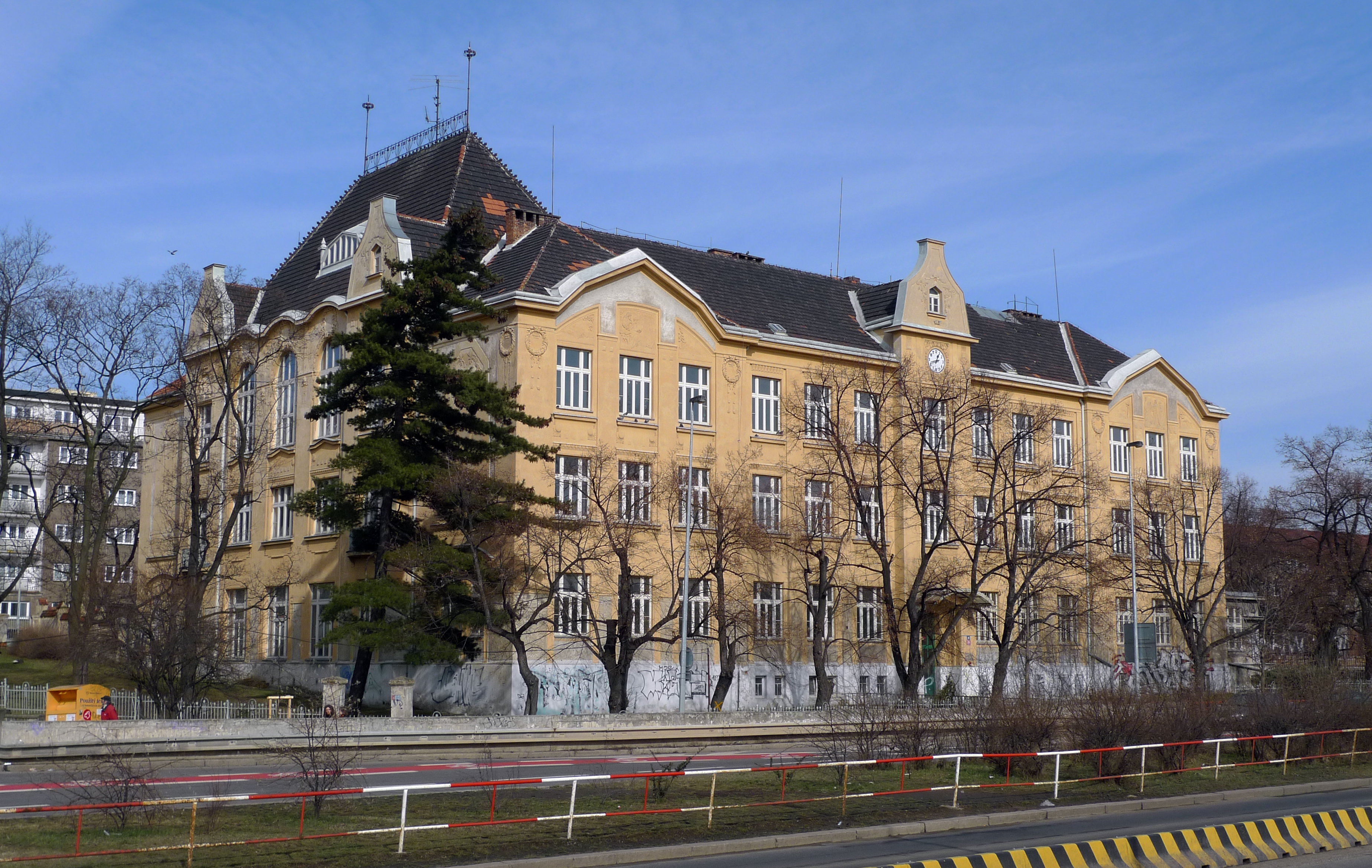 Praha 10: Nová strašnická škola z ulice V olšinách